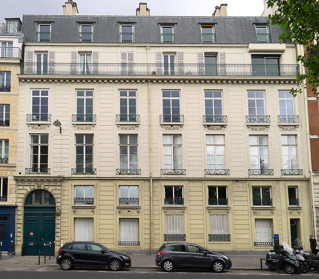 Hôtl du ci-devant président Rolland d'Erceville au 37 quai de la Tournelle à Paris